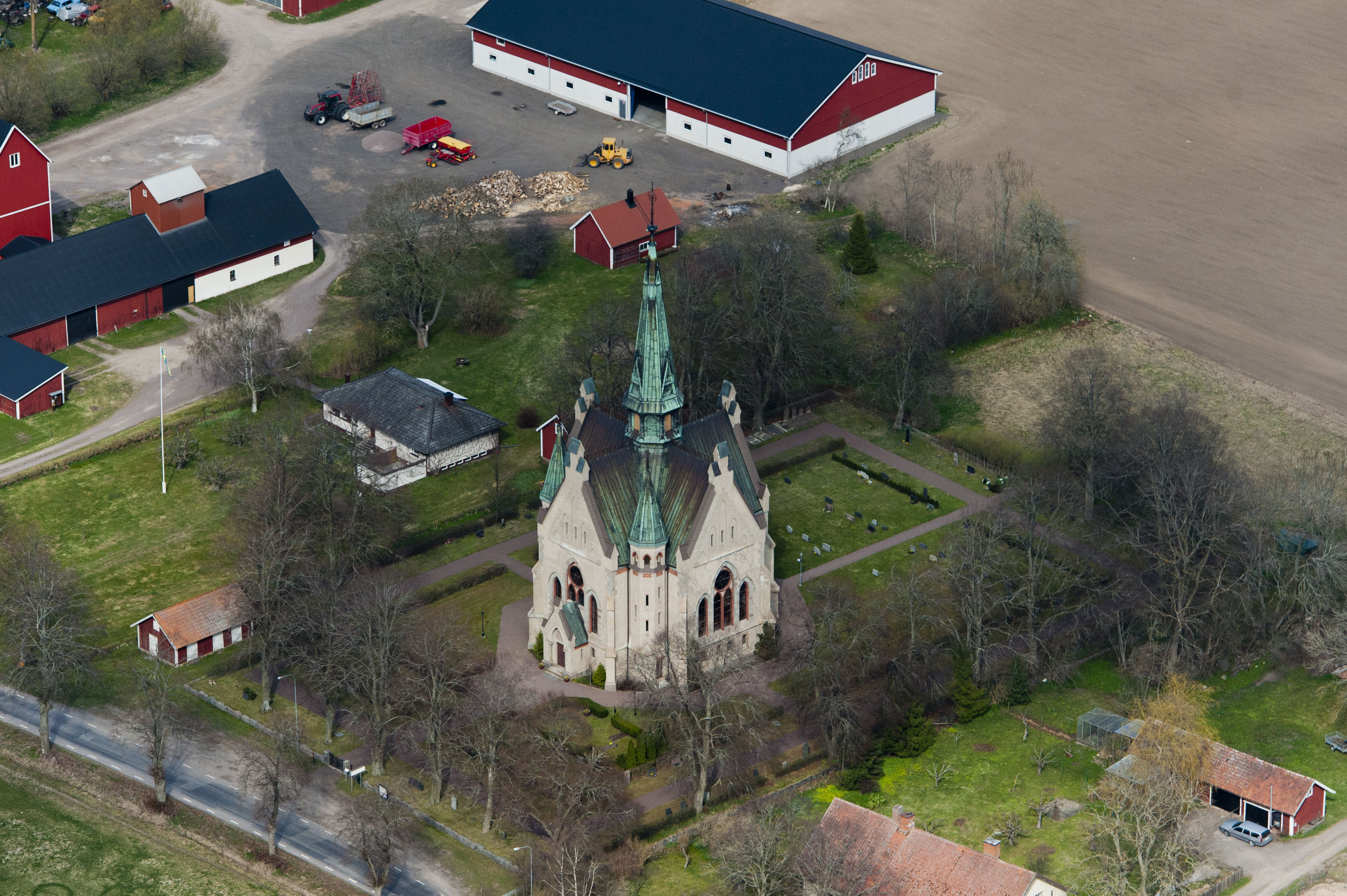 Orlunda ka